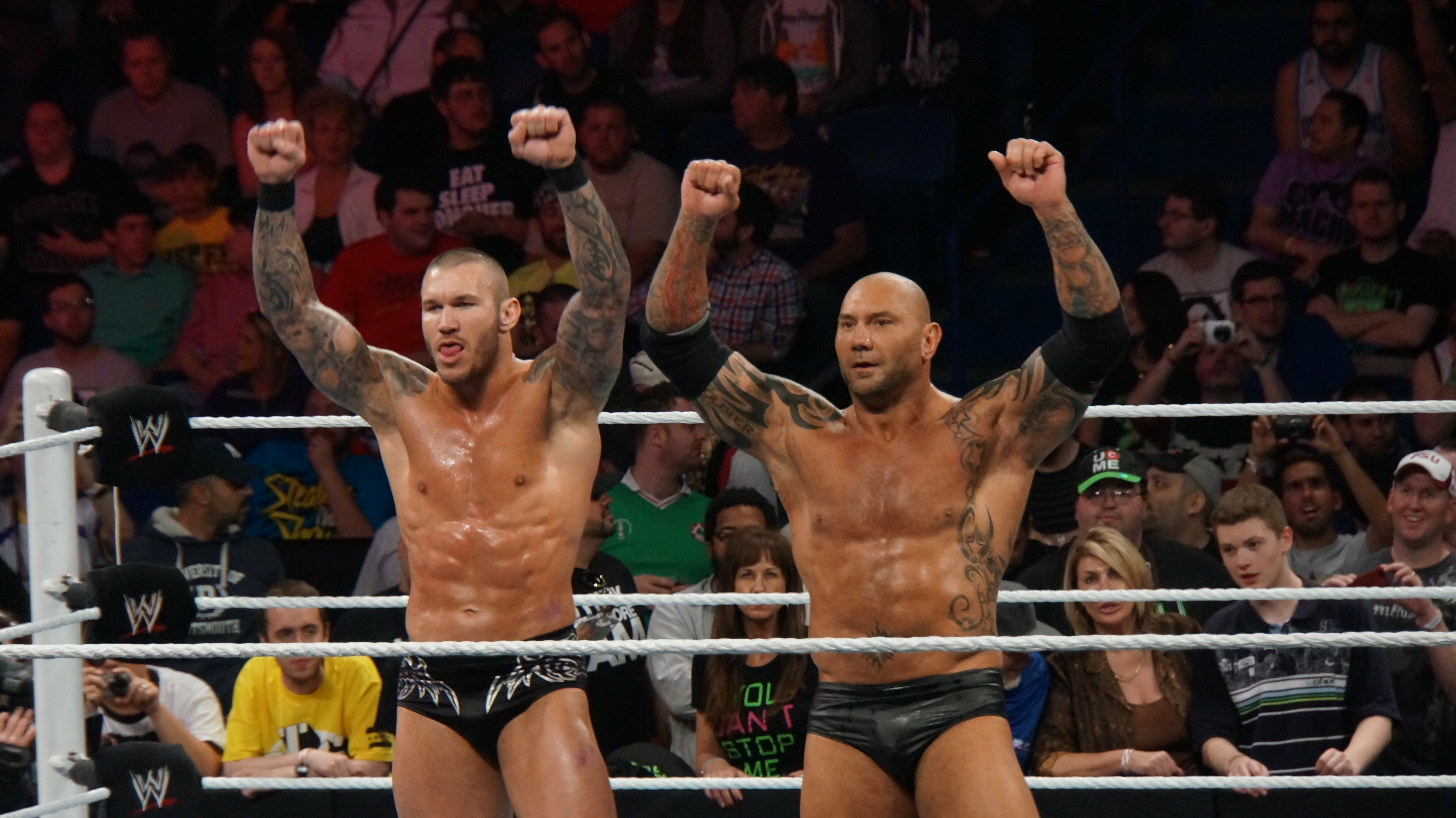 2014-04-07_20-23-08_NEX-6_DSC01281